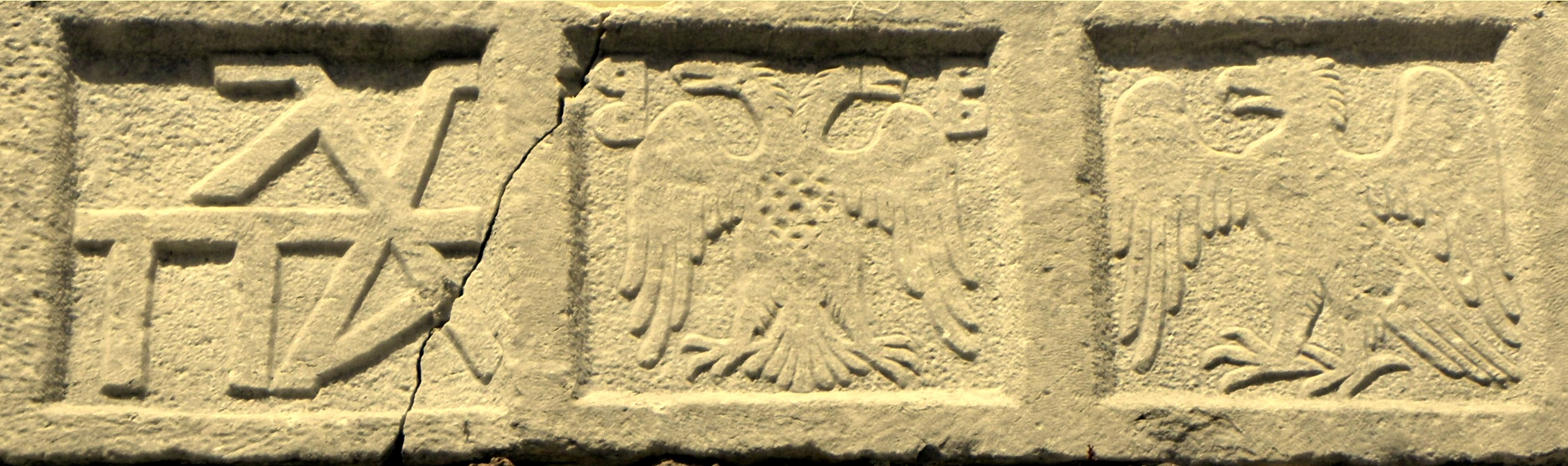 Pevnost v Mytiléně, Lesbos